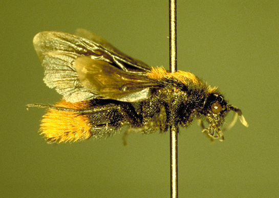 Male velvet ant Dasymutilla gloriosa